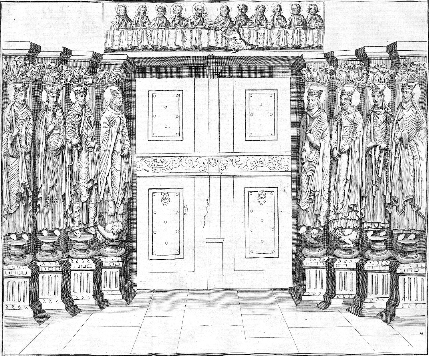 le porche de l'abbaye de st-Germain des prés in Trésor_des_antiquités_de_la_couronne_de_France,_La_Haye 1724/1745 par Dom Bouillart.